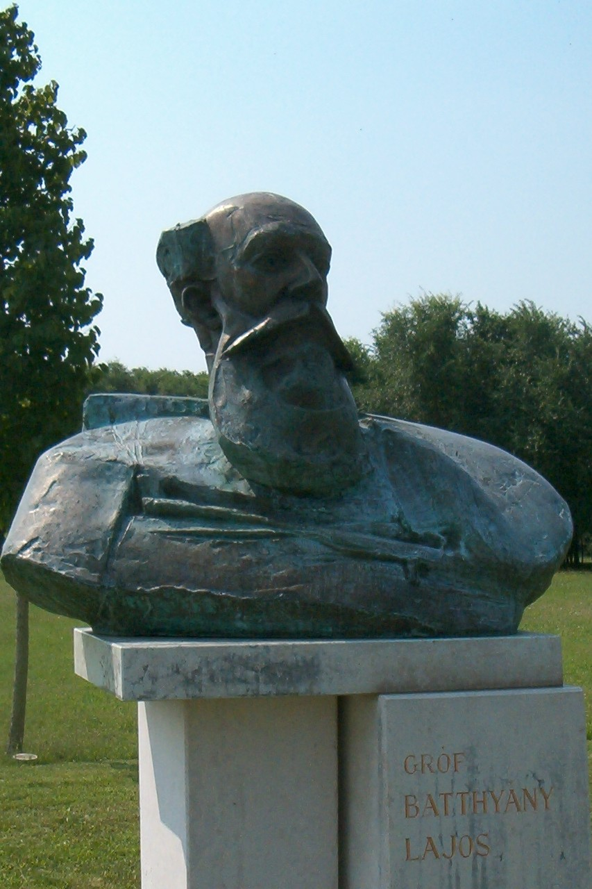 Batthyány Lajos. Gaál Tamás (*1962) alkotása Nemzeti Történeti Emlékpark / National Historical Memorial Park in Ópusztaszer, Hungary self shot photo (2005), Váradi Zsolt